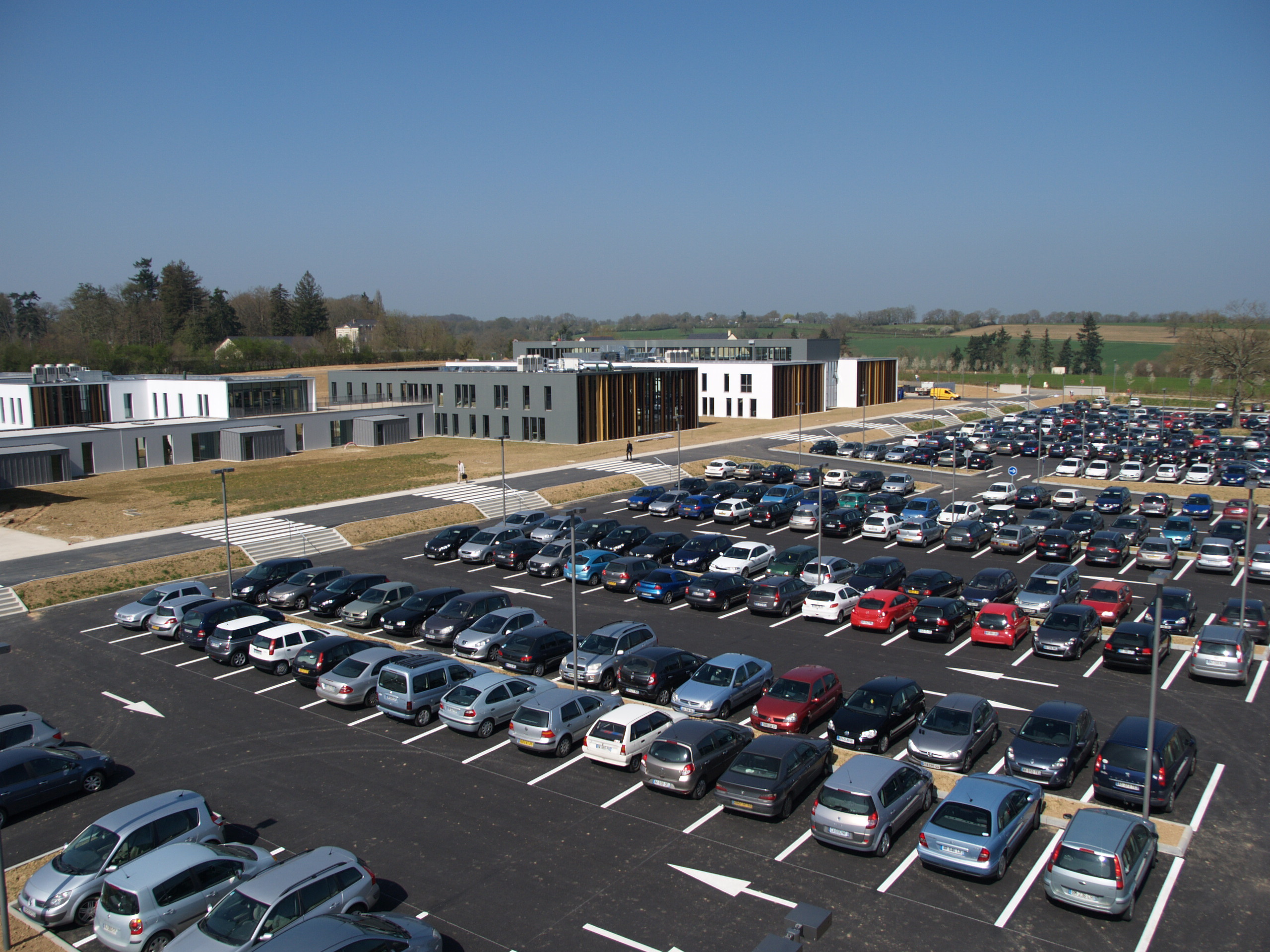 Noz Headquarter, Franec